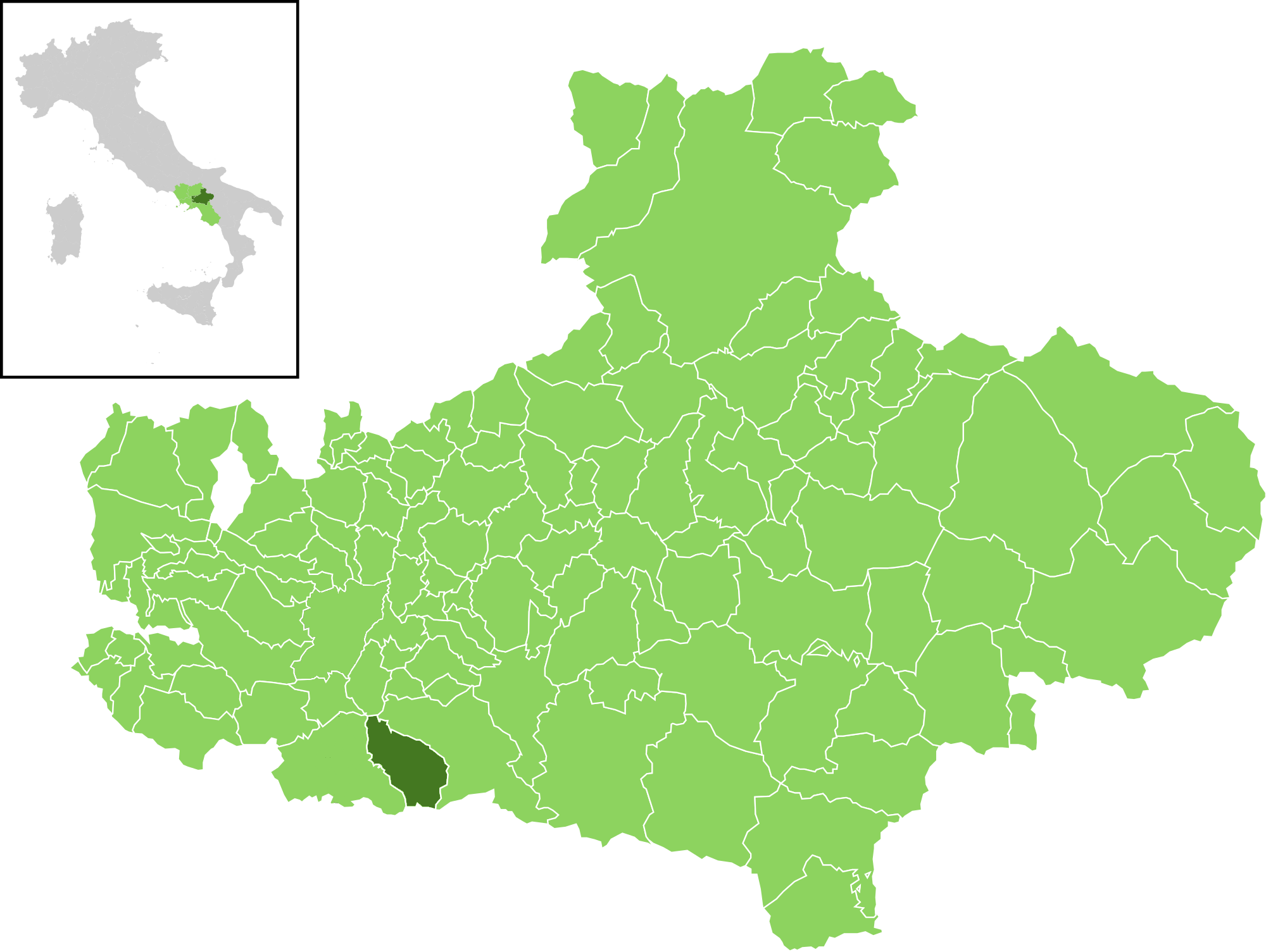 Posizione del comune all'interno della provincia di Avellino